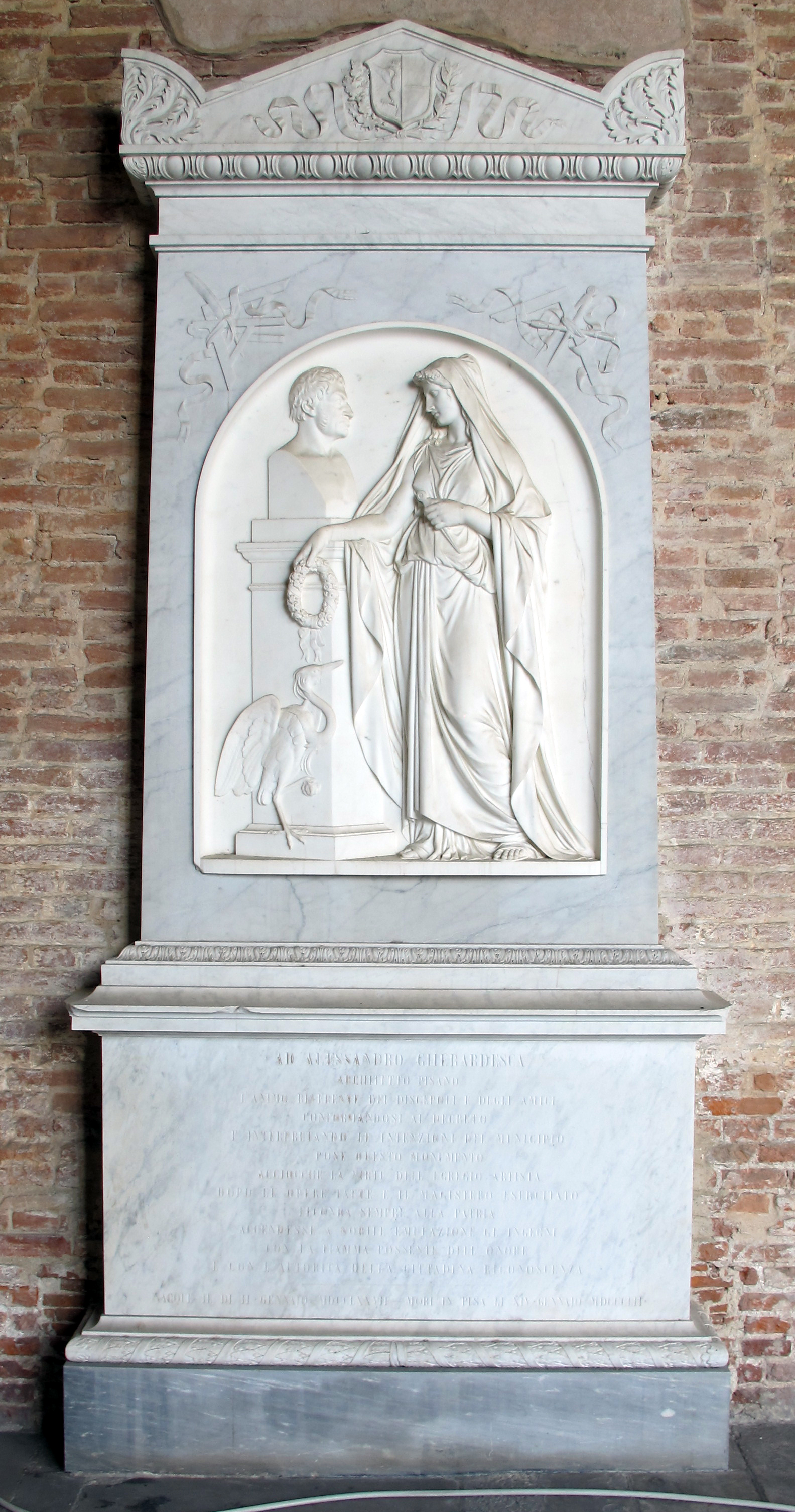 Monumento funebre dell'architetto Alessandro Della Gheradesca (m. 1852) di Emilio Santarelli